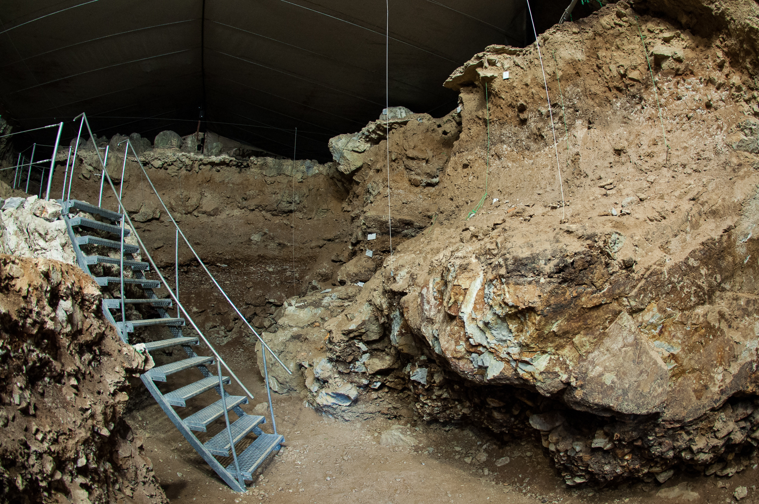 Grabungsstelle in der Höhle Divje Babe I bei Šebrelje, Idrija, Slowenien. In der Bildmitte die Fundstelle der "Divje Babe flute".